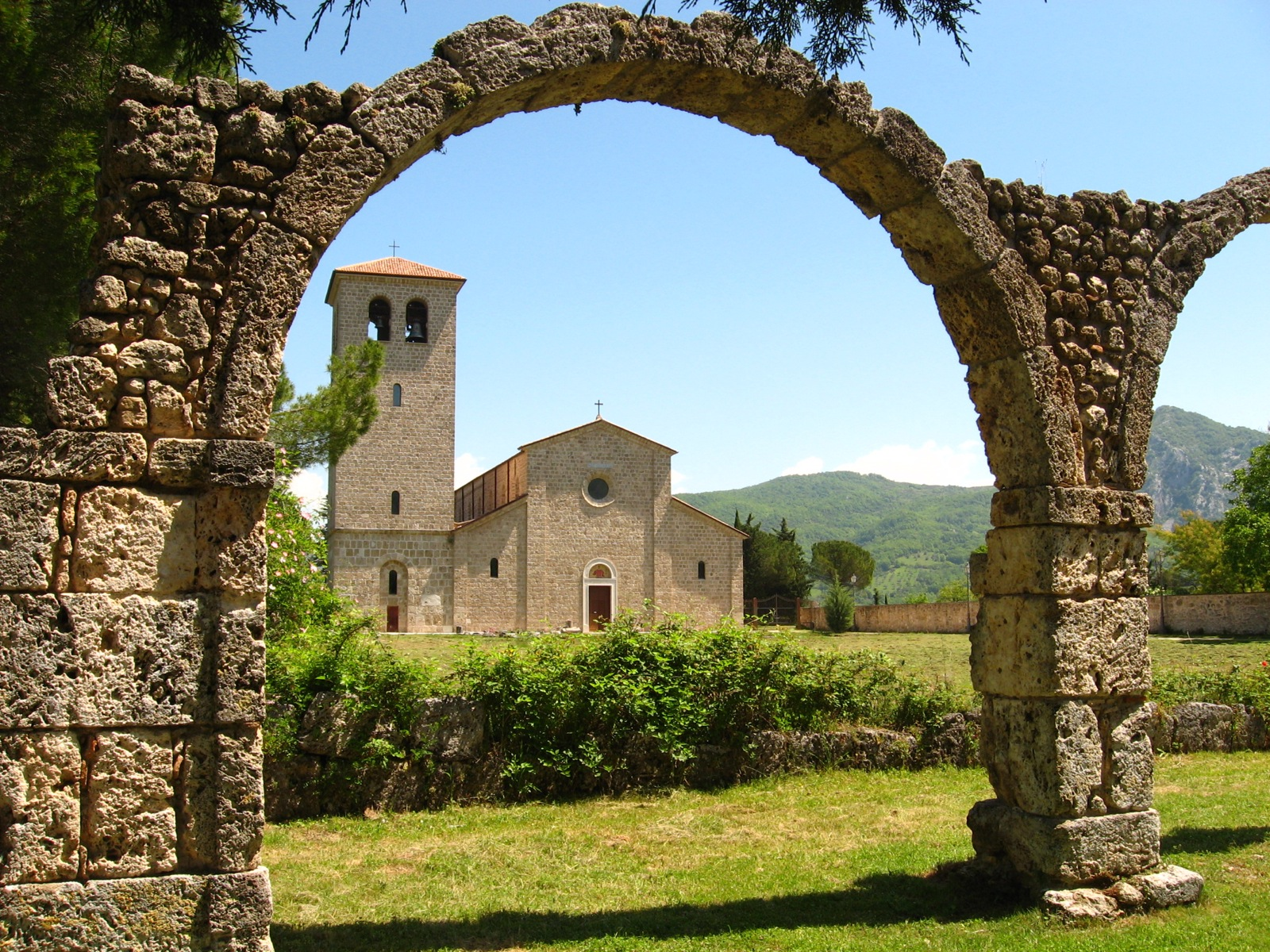 Monastero di San Vincenzo al Volturno, Castel San Vincenzo, Molise, Italy